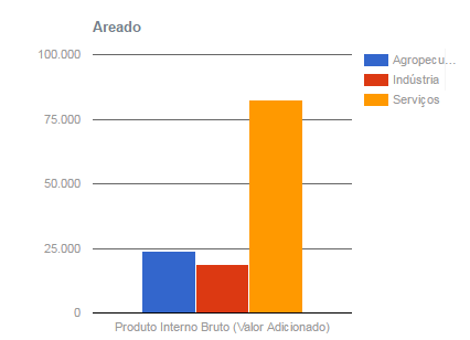 PIb ArEAdENSe